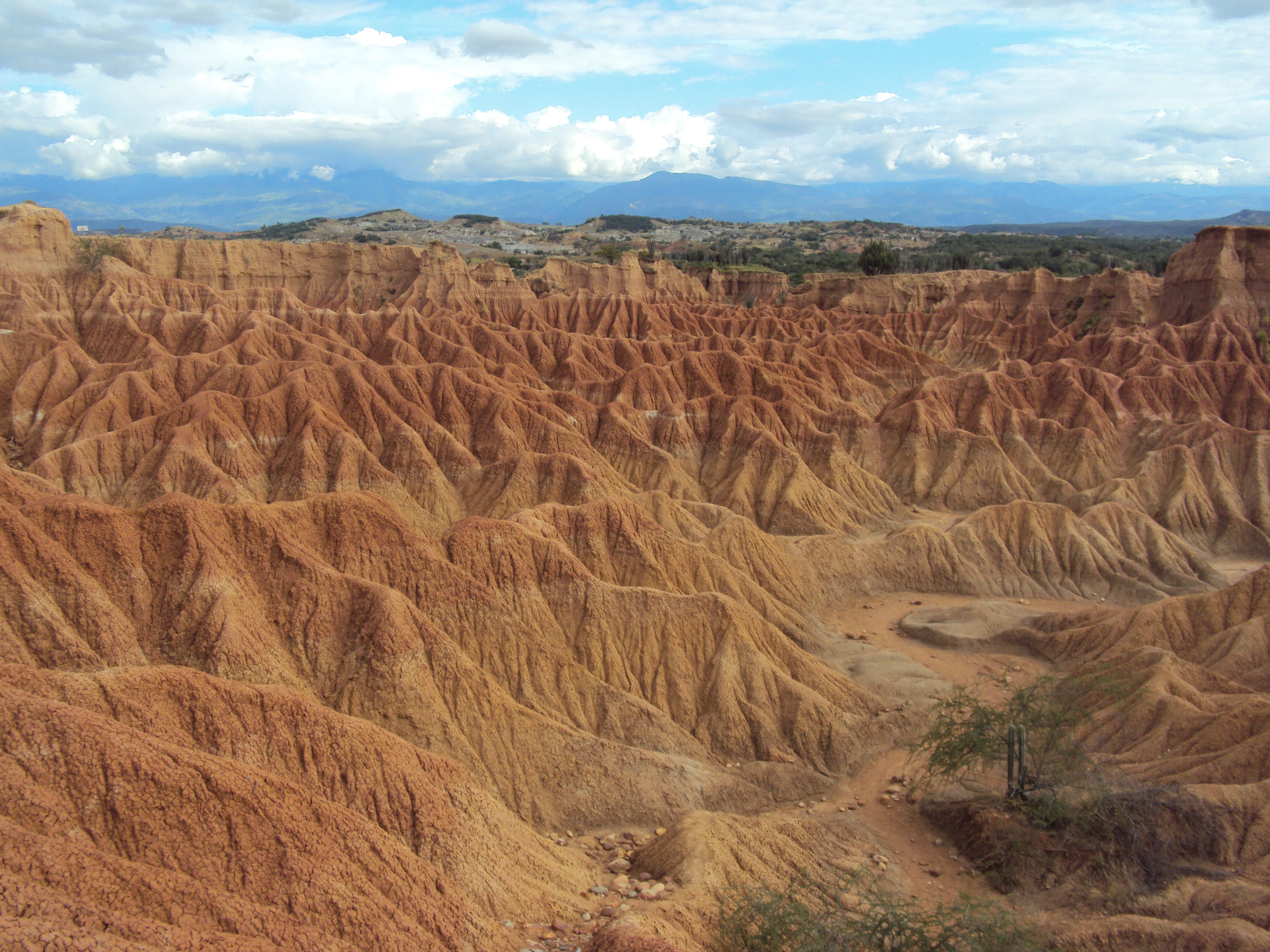 Formaciones montañosas que en la antigüedad hacían parte de un lago y hoy en día conforman la zona más árida del desierto. Esta fotografía fue tomada en el municipio colombiano con código 41872.